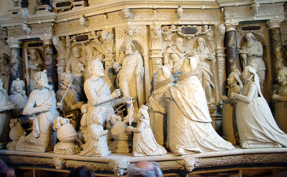 Lauensteiner Kirche, Bünau - Grabkammerrelief aus Sandstein im Detail